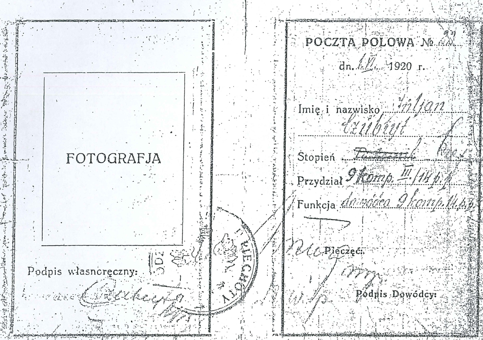 Legitymacja żołnierska z 1920 roku str. 2